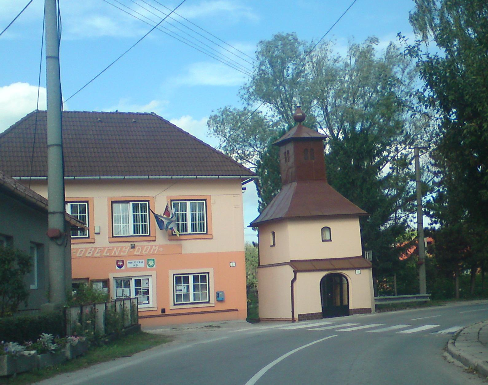 Obecný dom a kaplnka v centre obce